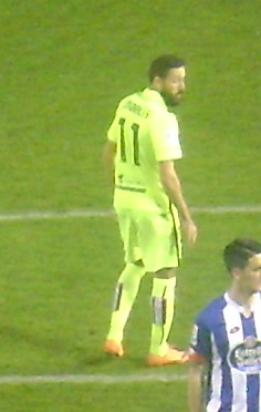 Morales